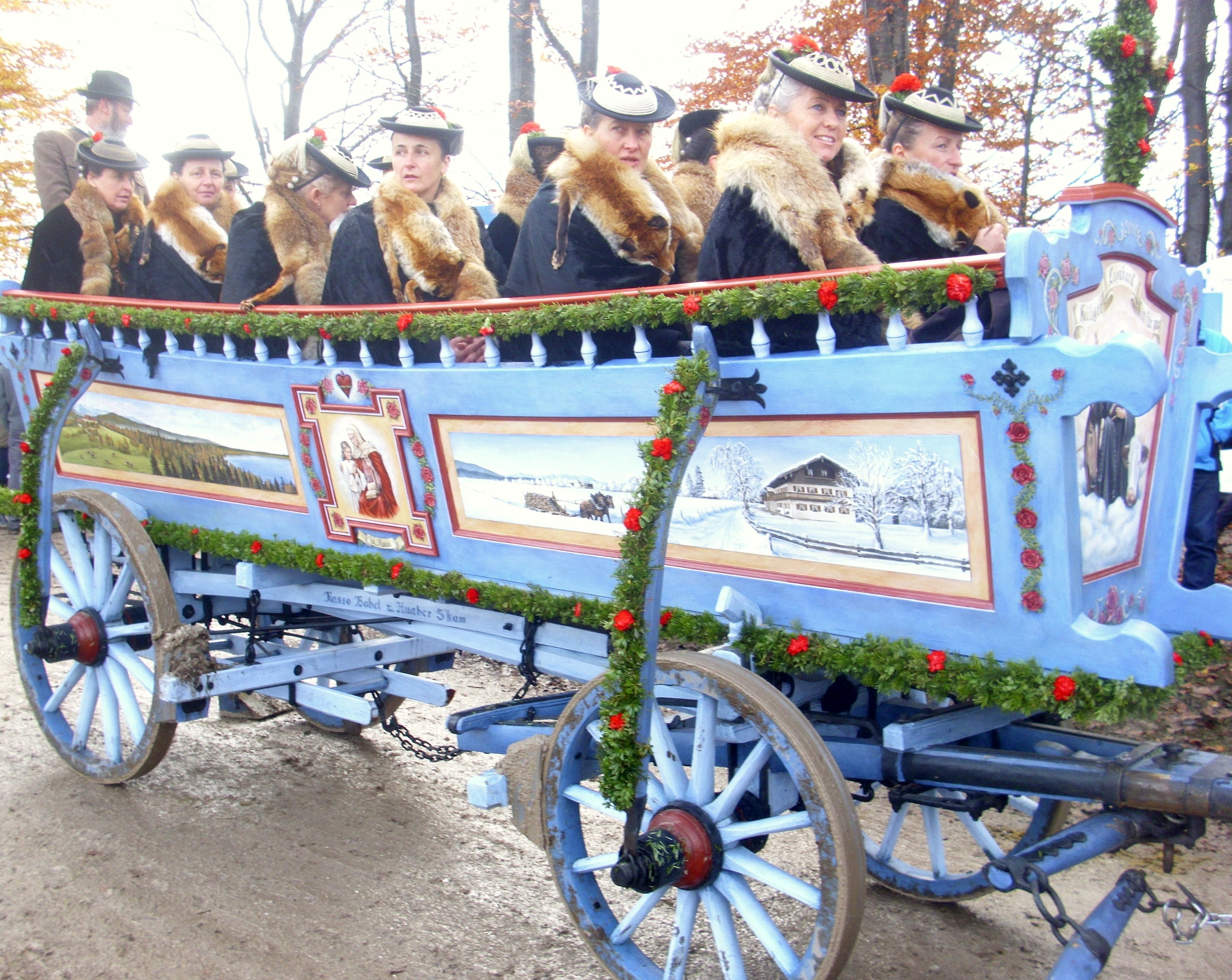 Leonhardifahrt Tölz 2016